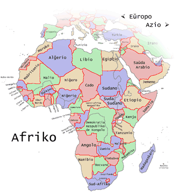 Mapo de Afriko.